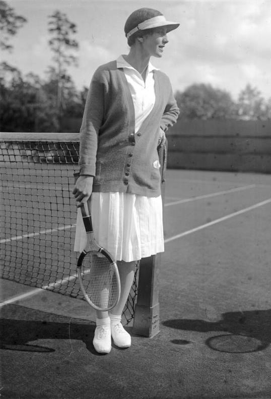 Die amerikanische Tennisweltmeisterin Helen Wills in Berlin! Die schöne amerikanische Weltmeisterin Hellen Wills auf den Rot-weiss-Tennisplätzen in Berlin-Grunewald. Uner Bild zeigt sie im Dress. Der Schirmschutz für die Augen ist eine Erfindung der Helen Wills, auf welche sie Patente hat.